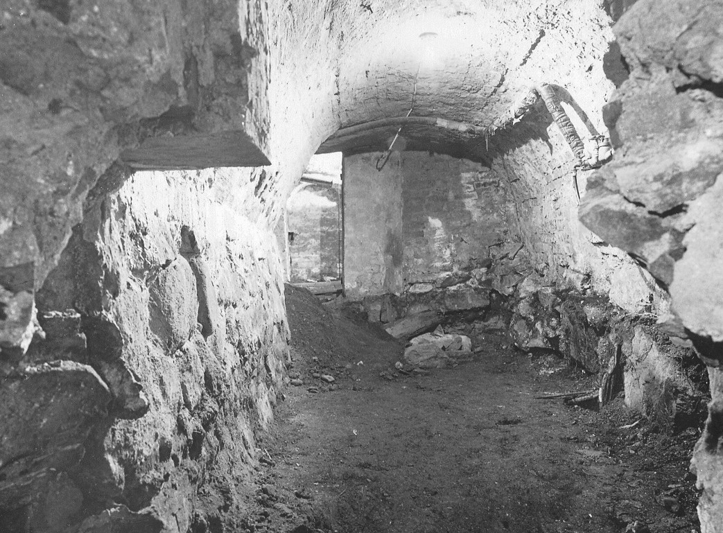 Ett av kvarteret Pythons källarvalv (Python 5) som idag ingår i restaurangen "Fem små hus".